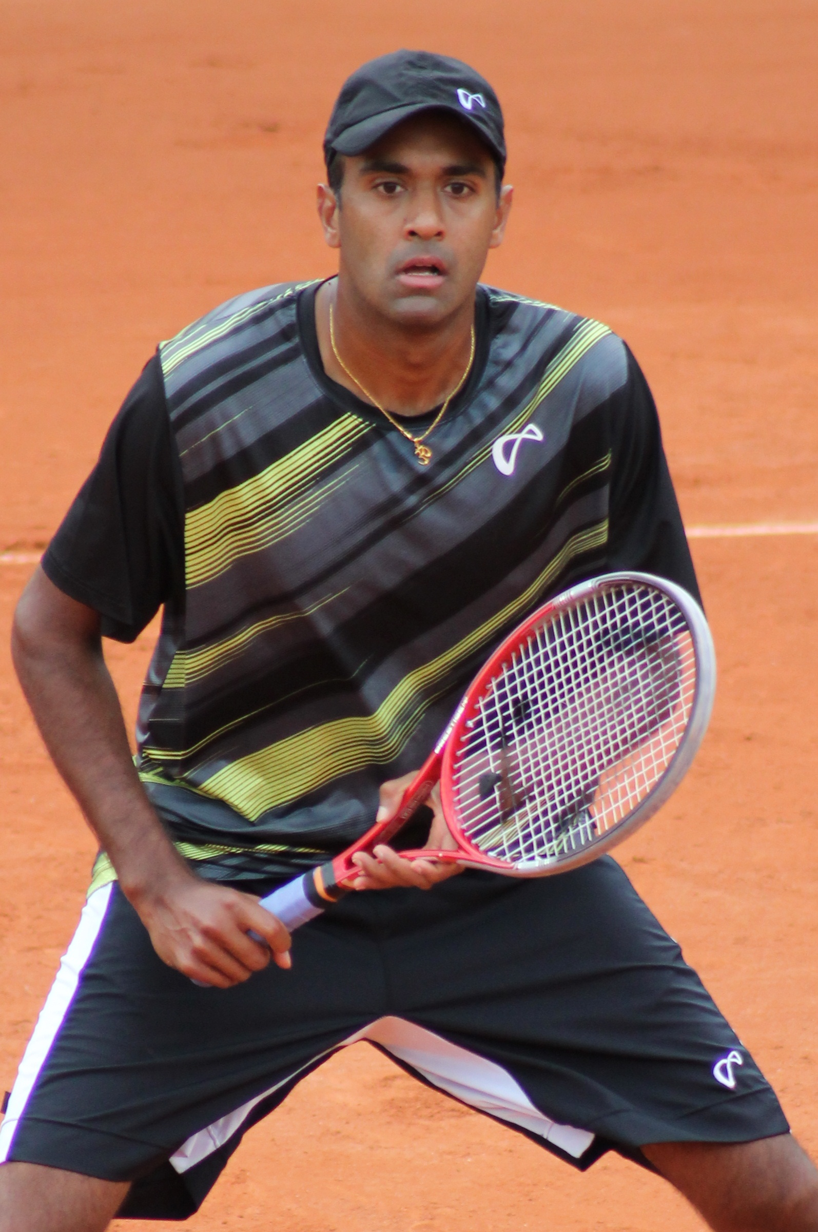 Ram R. RG13 (6)